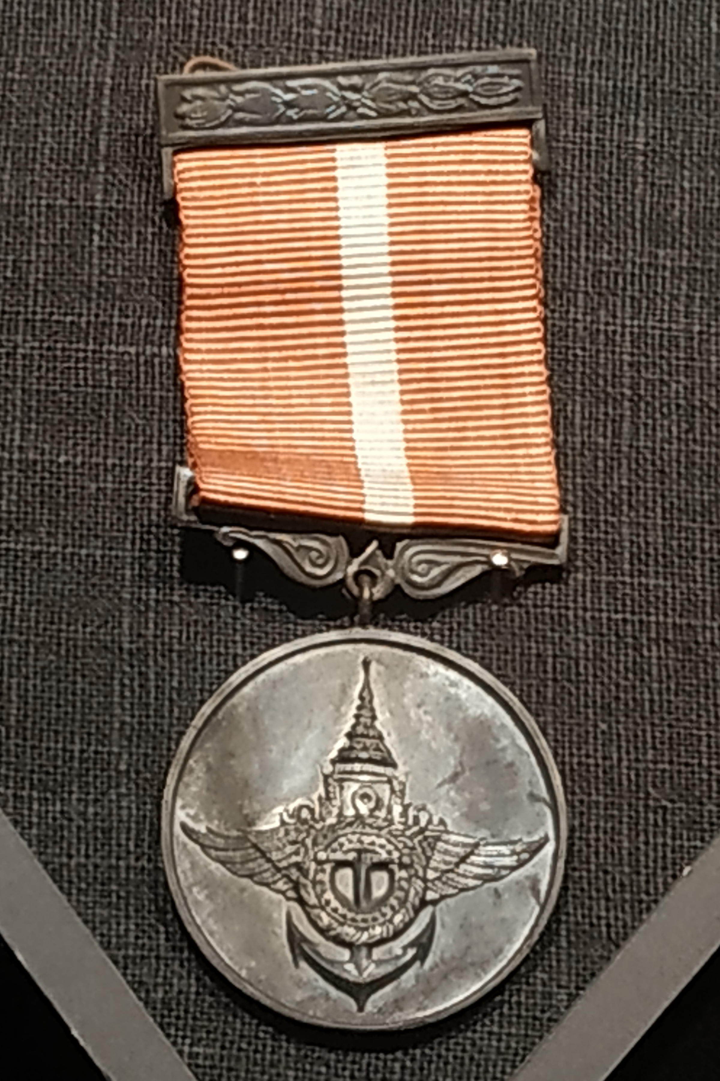 เหรียญช่วยราชการเขตภายใน กรณีพิพาทอินโดจีน สำหรับบุรุษ บันทึกภาพจากพิพิธภัณฑ์เหรียญกษาปณานุรักษ์ ถนนจักรพงษ์ เขตพระนคร กรุงเทพมหานคร ประเทศไทย เมื่อวันที่ 29 กุมภาพันธ์ พ.ศ. 2563